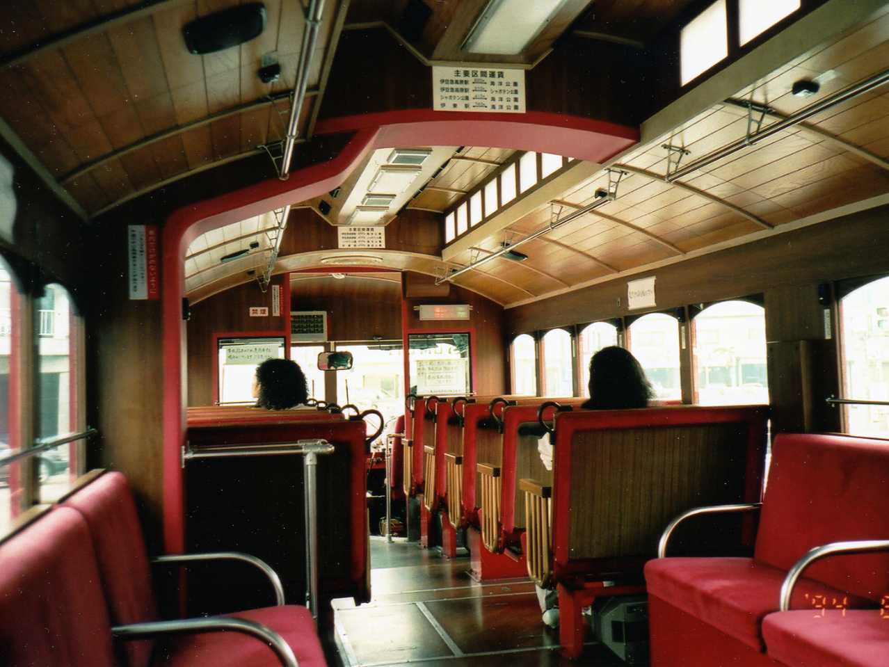 Tokai Bus 333 "RING A BELL" inside Hino P-CG277AA